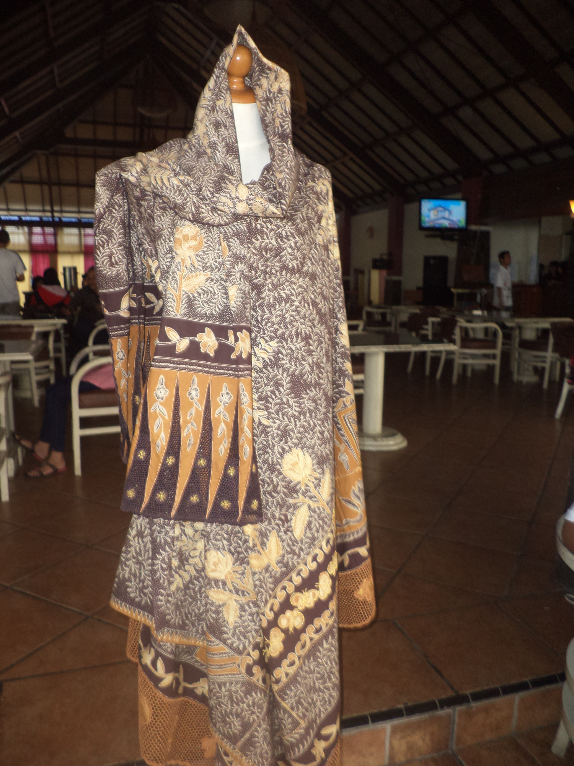 Batik Tulis Halus Kolaborasi BORDIR